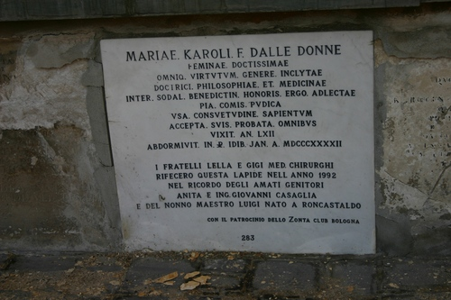 Epigrafe della dottoressa Maria Dalle Donne nel cimitero della Certosa di Bologna